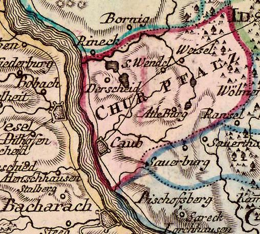 Nürnberg : Kunsthandlung Adam Gottlieb Schneider u. Weigels, 1801; [Electronic ed.] Koblenz : Landesbibliothekszentrum Rheinland-Pfalz, 2010.